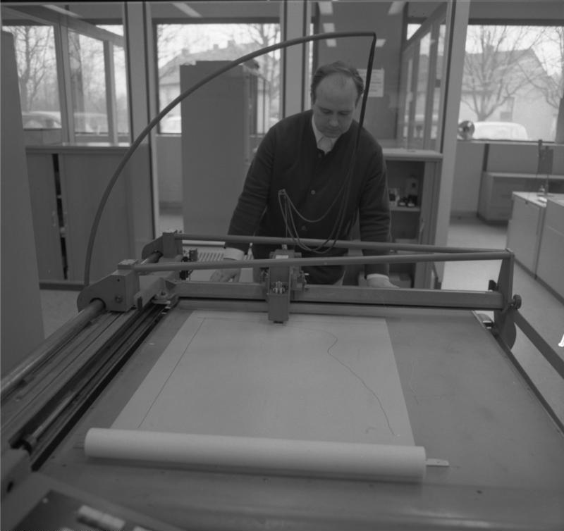 Technische Hochschule Aachen Rechenzentrum